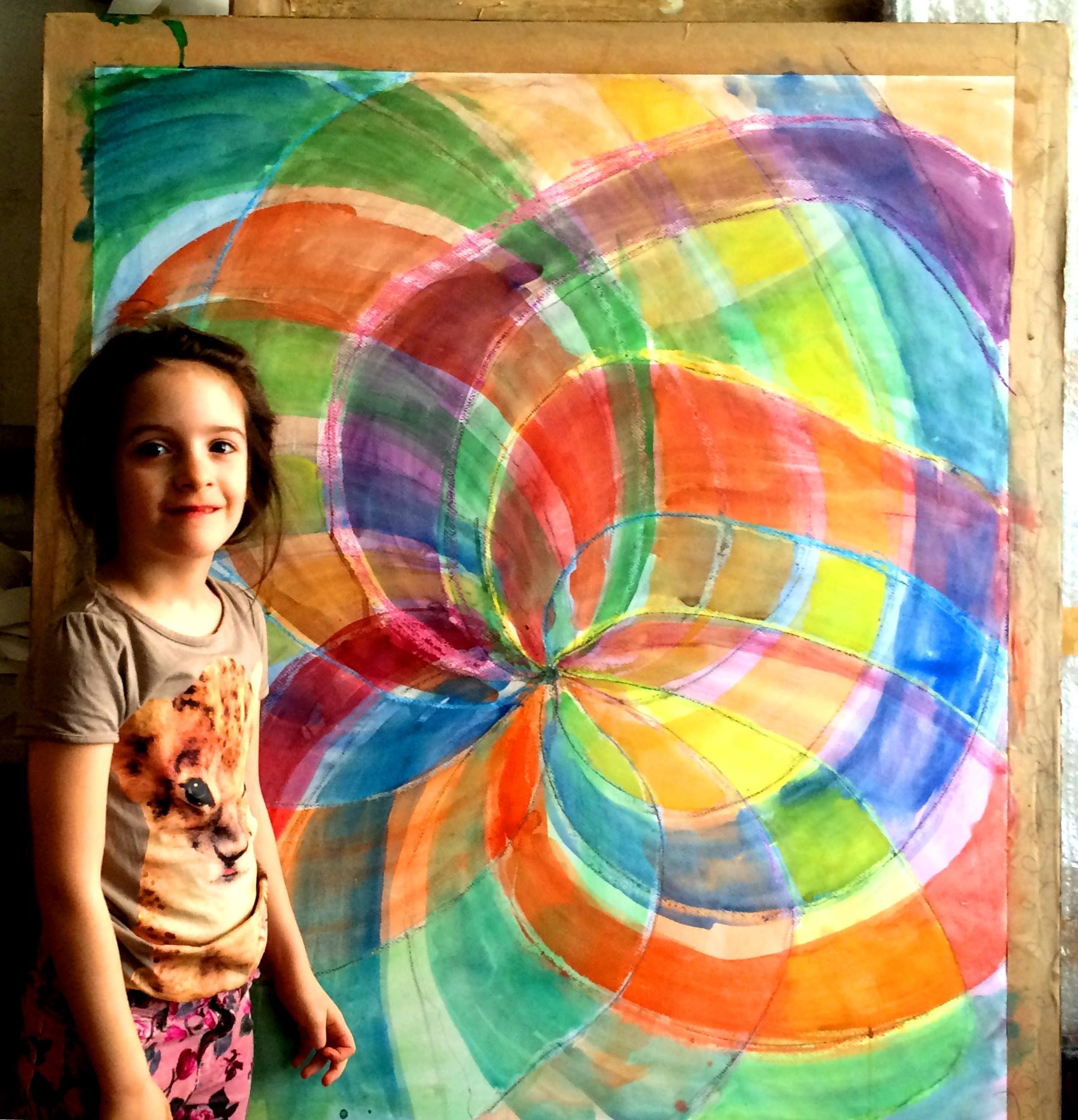 Barabás Lujza (művésznevén: Luisa Barabas) (2008. november 4.−) festő. A legfiatalabb magyar, akinek festményei a párizsi Louvre-ban is kiállításra kerültek.